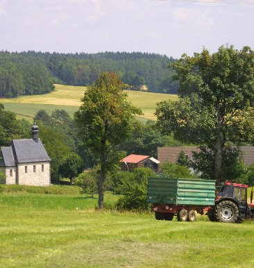 Laibarös von Westen mit Kapelle